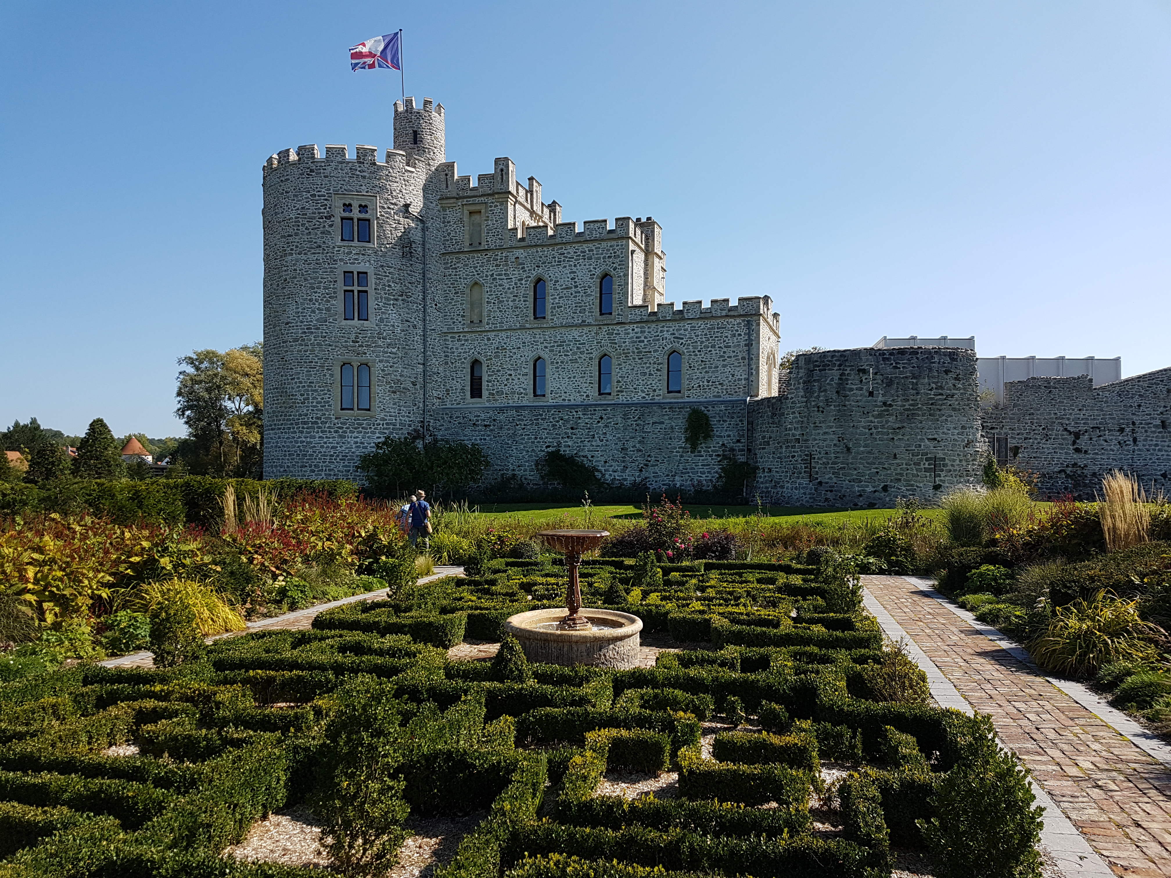 Jardins du château d'Hardelot (Pas-de-Calais, France)